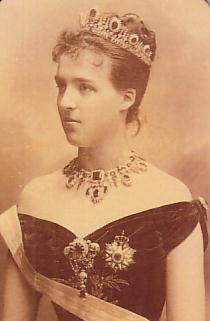 Amélie Marie Louise Hélène of Orleans